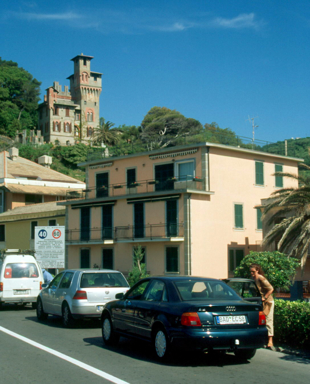 Moneglia 2004